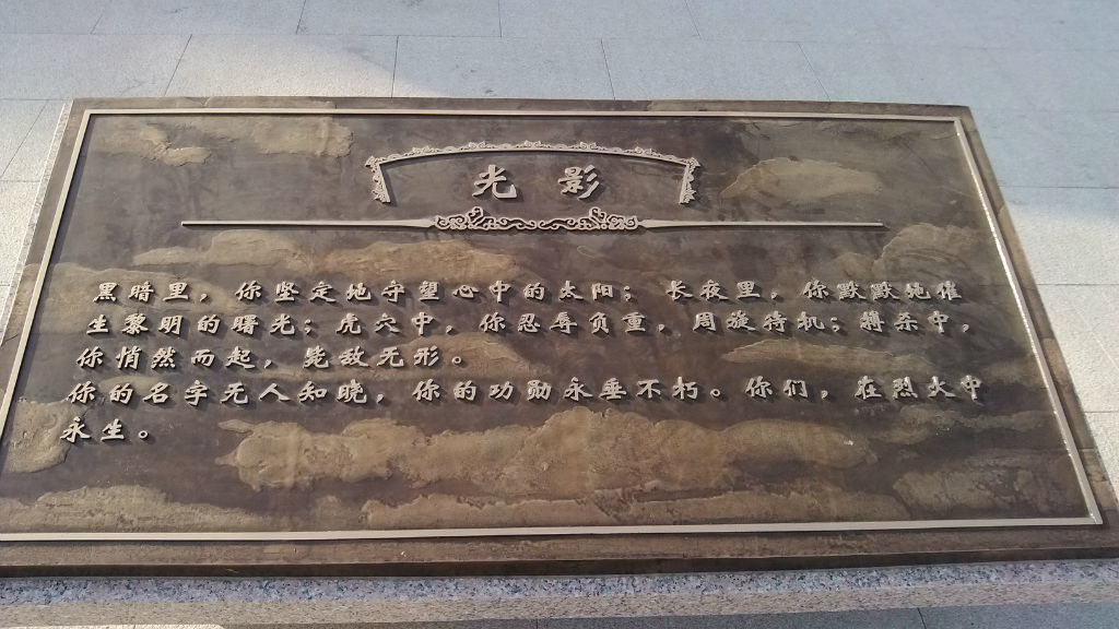 光影